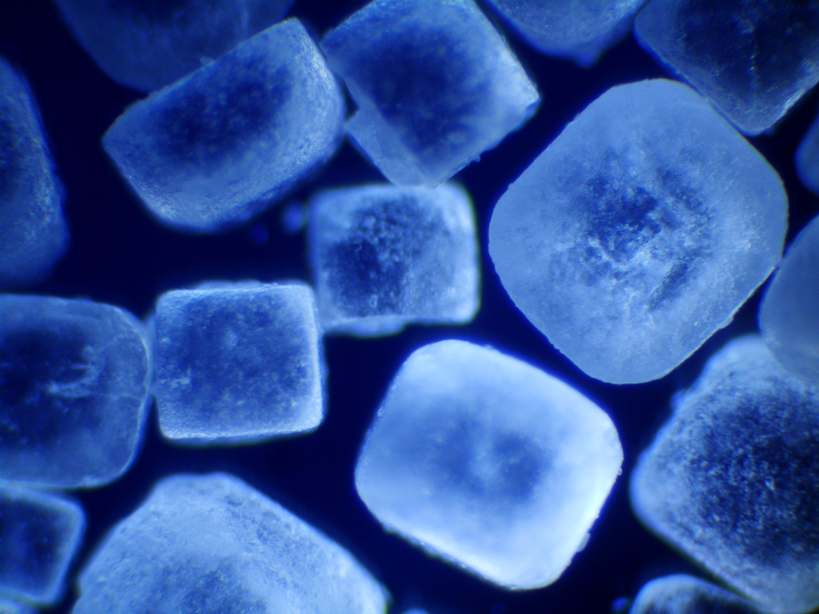 Sól kuchenna, kryształy